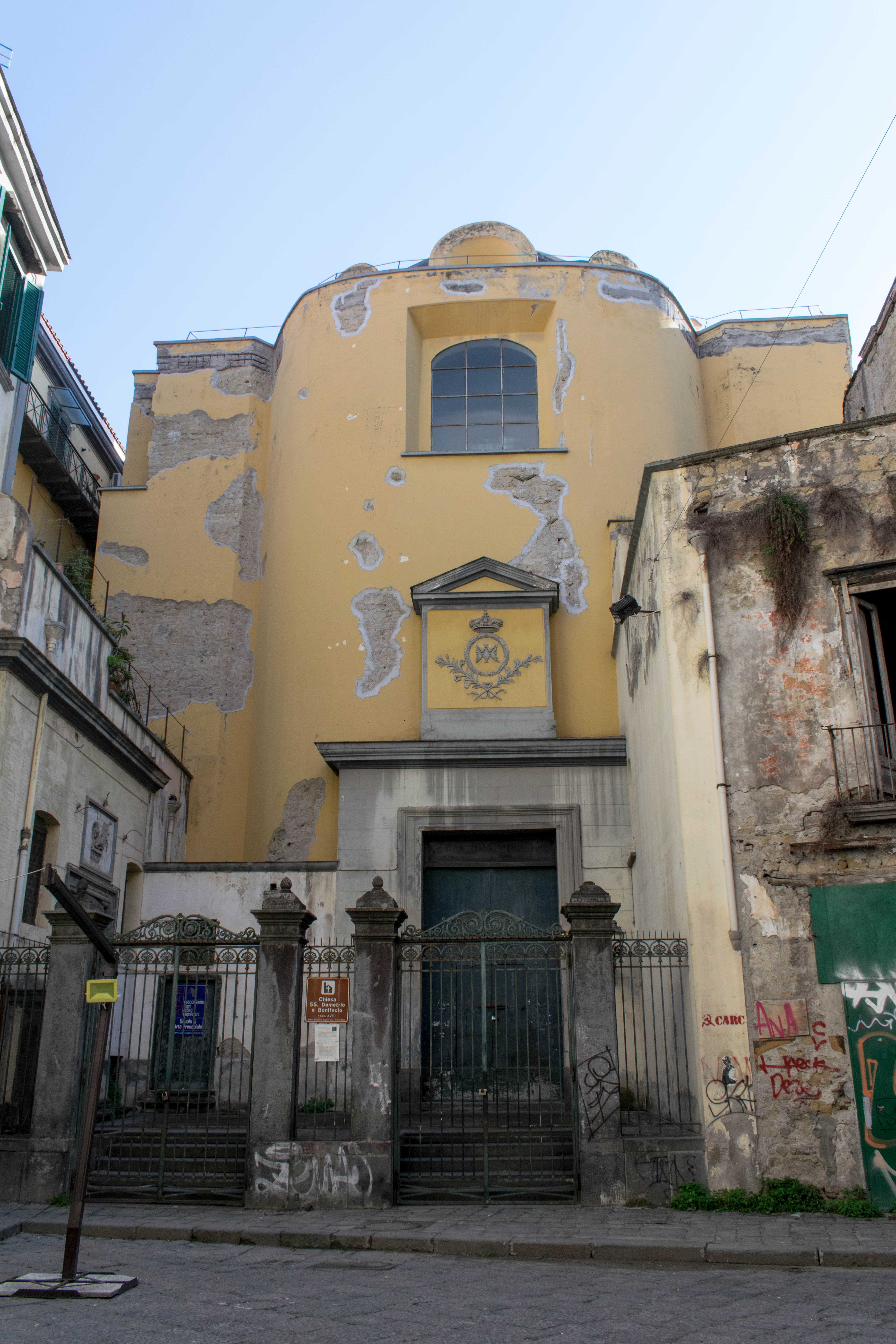 Chiesa dei Santi Demetrio e Bonifacio (Napoli)